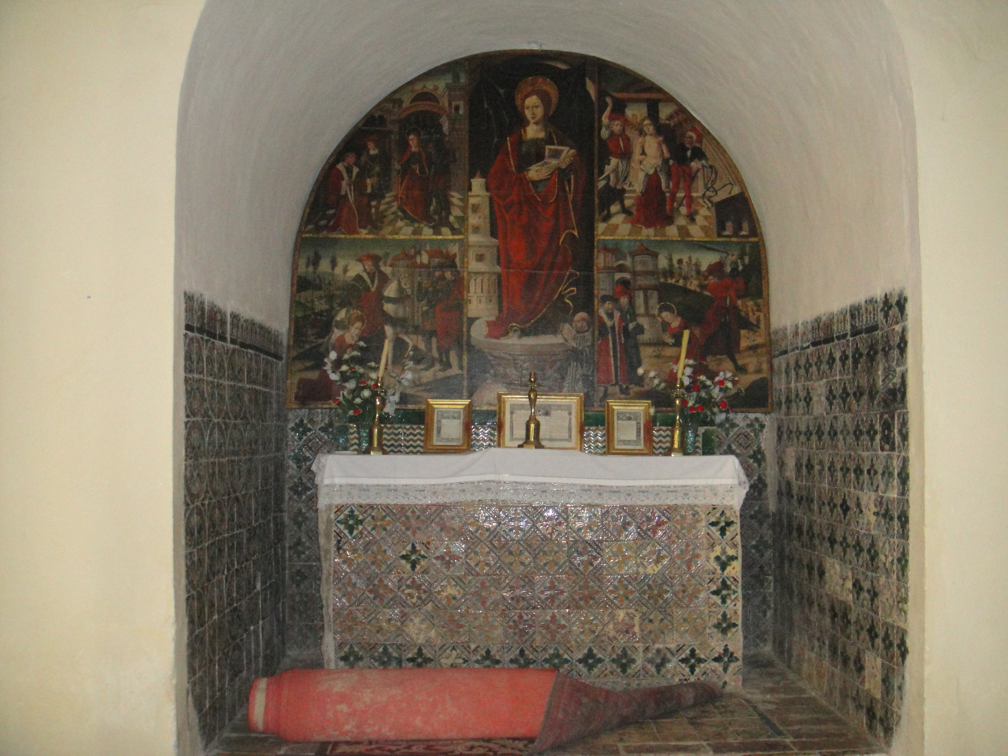 Retablo de la capilla de Santa Bárbara de la iglesia de Nuestra Señora del Castillo de Fuente Obejuna, provincia de Córdoba, (España).